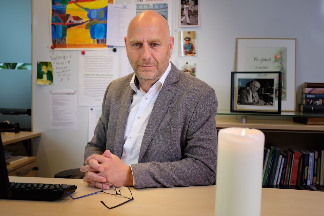 Sjirk Kuiper op kantoor (2019)